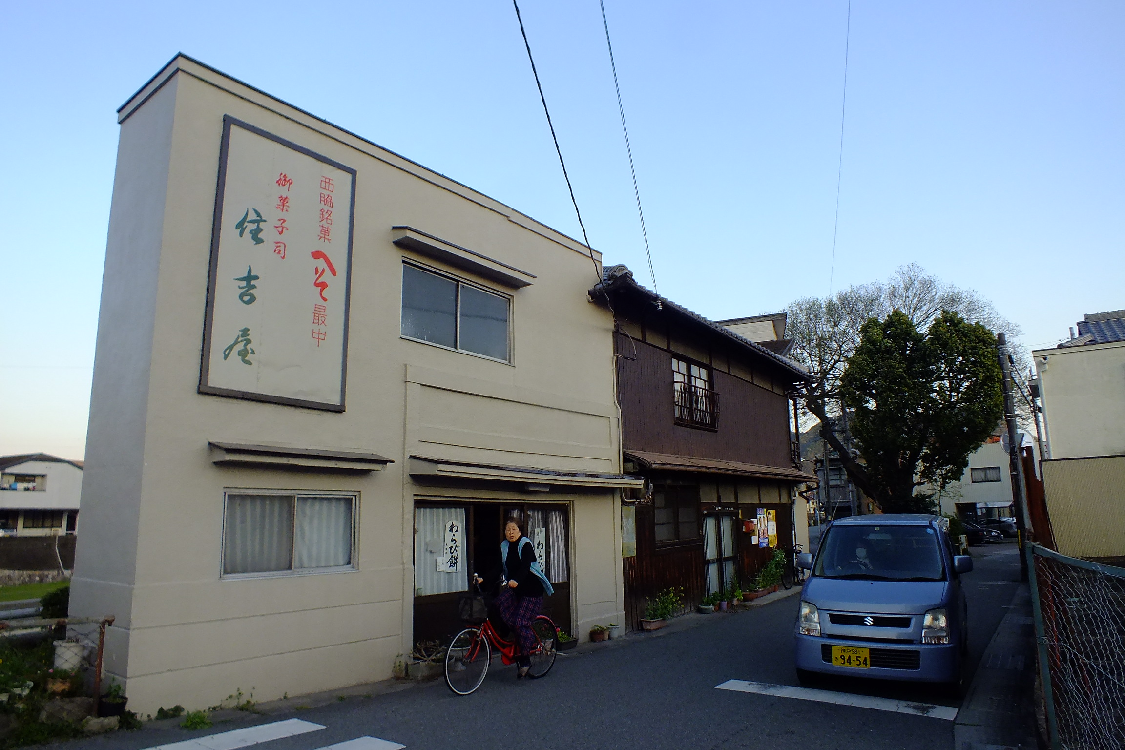 Sumiyoshiya 住吉屋 へそ最中 横尾忠則デザインの包装紙を使用。